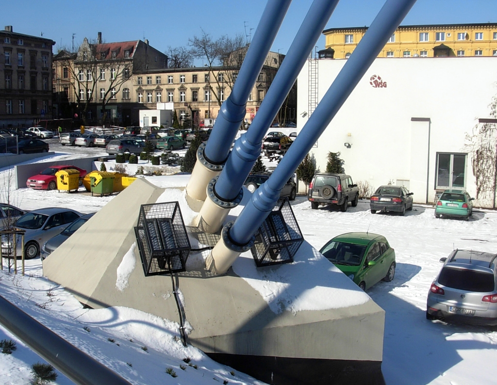 Most tramwajowy nad Brdą im. Władysława Jagiełły w Bydgoszczy